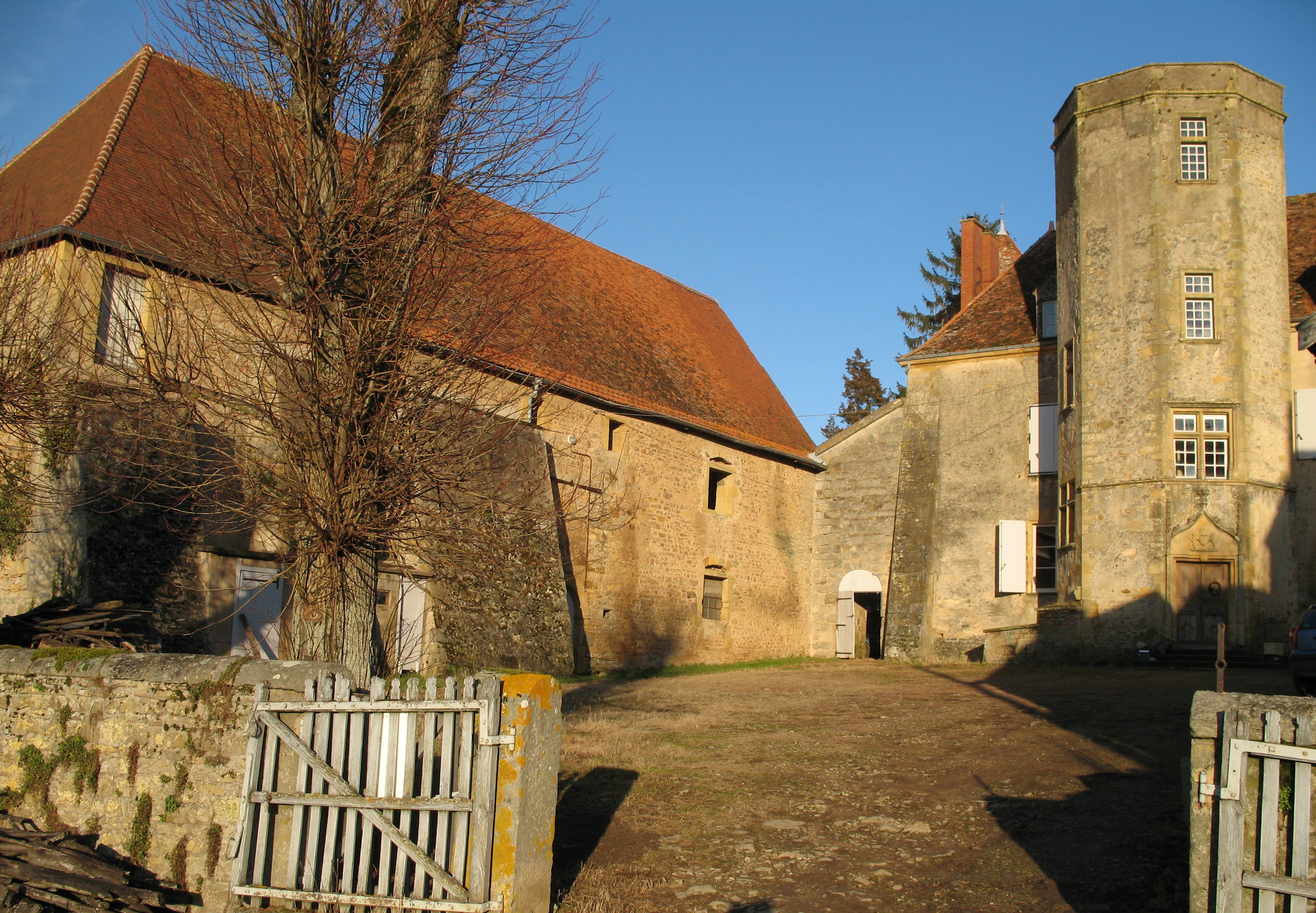 château d'Oyé (Saône-et-Loire)